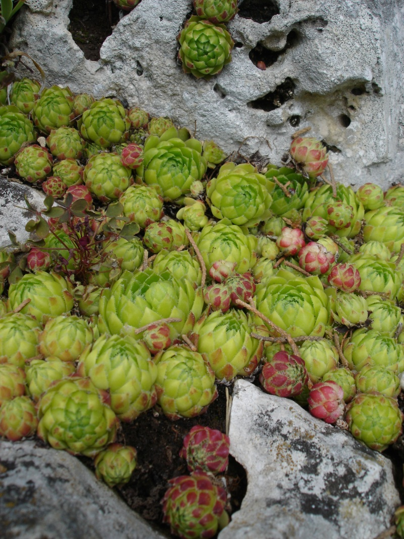 Jovibarba sobolifera (Sims) Opiz = Sempervirum soboliferum Sims, Jardin alpin, Jardin des Plantes de Paris